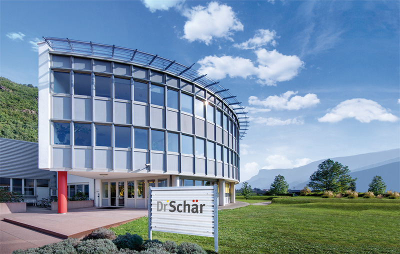 Dr. Schär Hauptgebäude